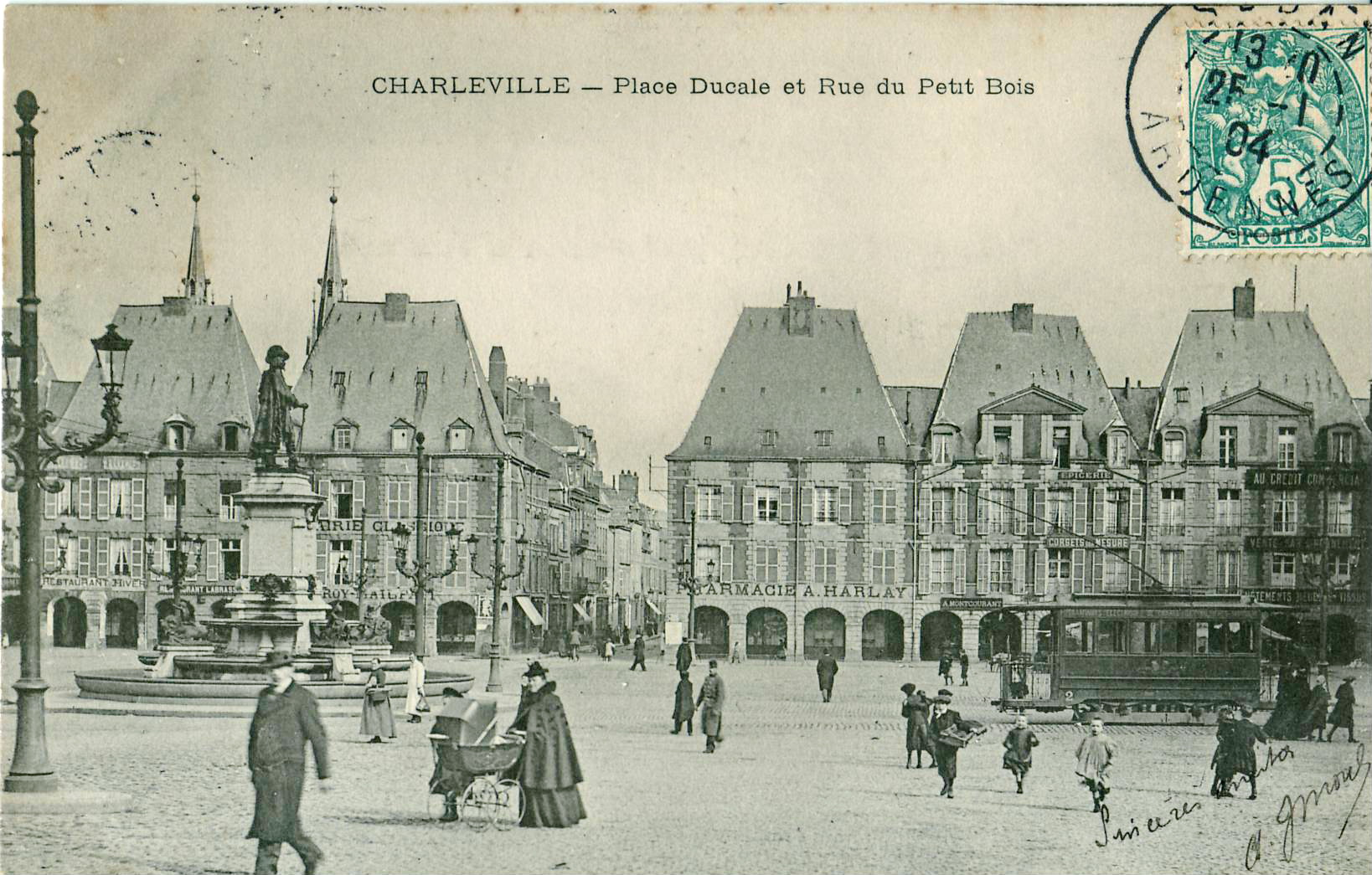 Carte postale ancienne, sans mention d'éditeur : CHARLEVILLE - Place Ducale et Rue du Petit Bois